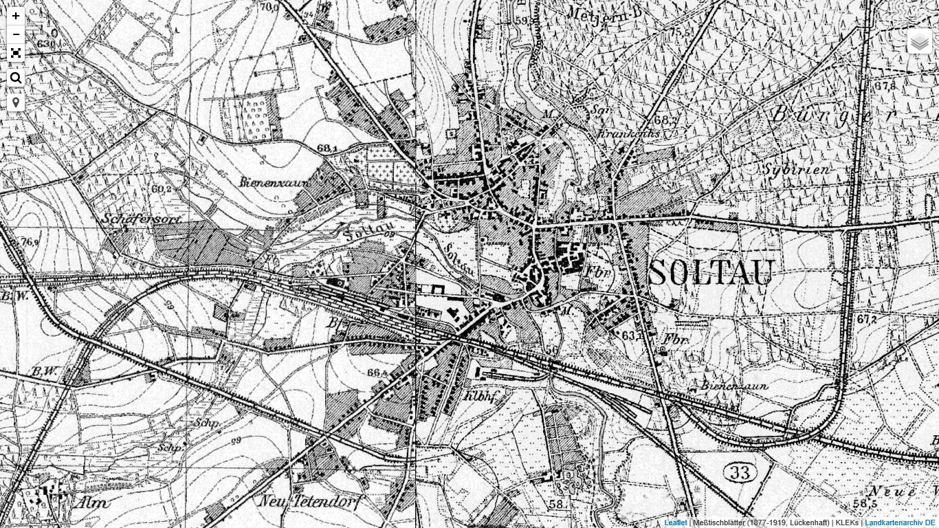 Soltau um 1900 als Ausschnitt aus der Übersicht der vom Reichsamt für Landesaufnahme Berlin im Maßstab 1:25.000 der natürlichen Lage veröffentlichten Messtischblättern [1868-1945], Königliche Preussische Landesaufnahme bzw. Reichsamt für Landesaufnahme